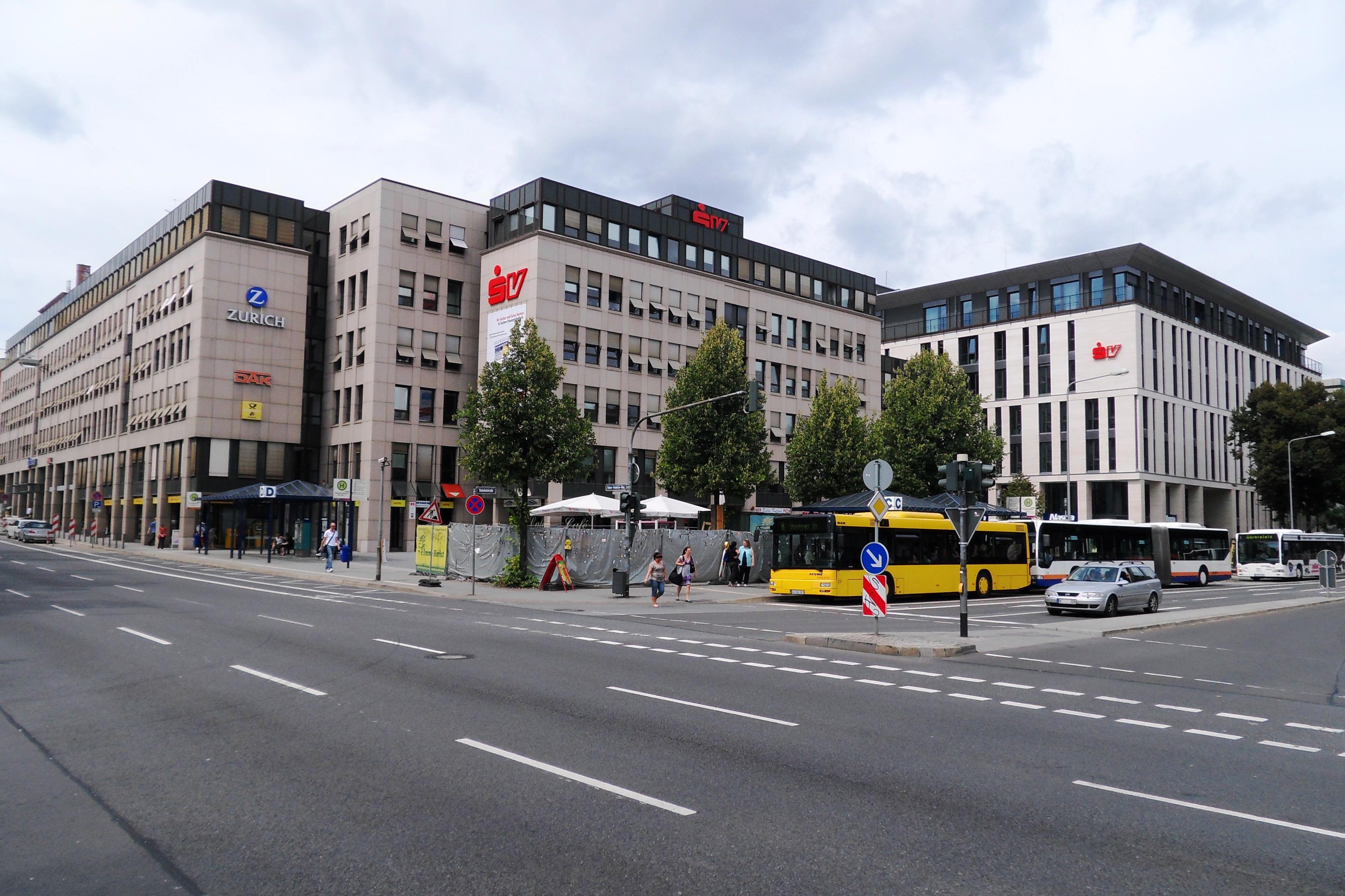 Zweigniederlassung Wiesbaden der SV SparkassenVersicherung am Bahnhofsplatz in Wiesbaden, davor die Bussteige C und D der Stadtbusse